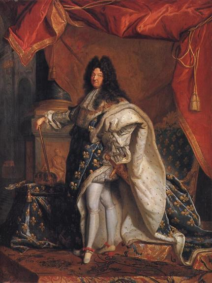 Louis XIV de France